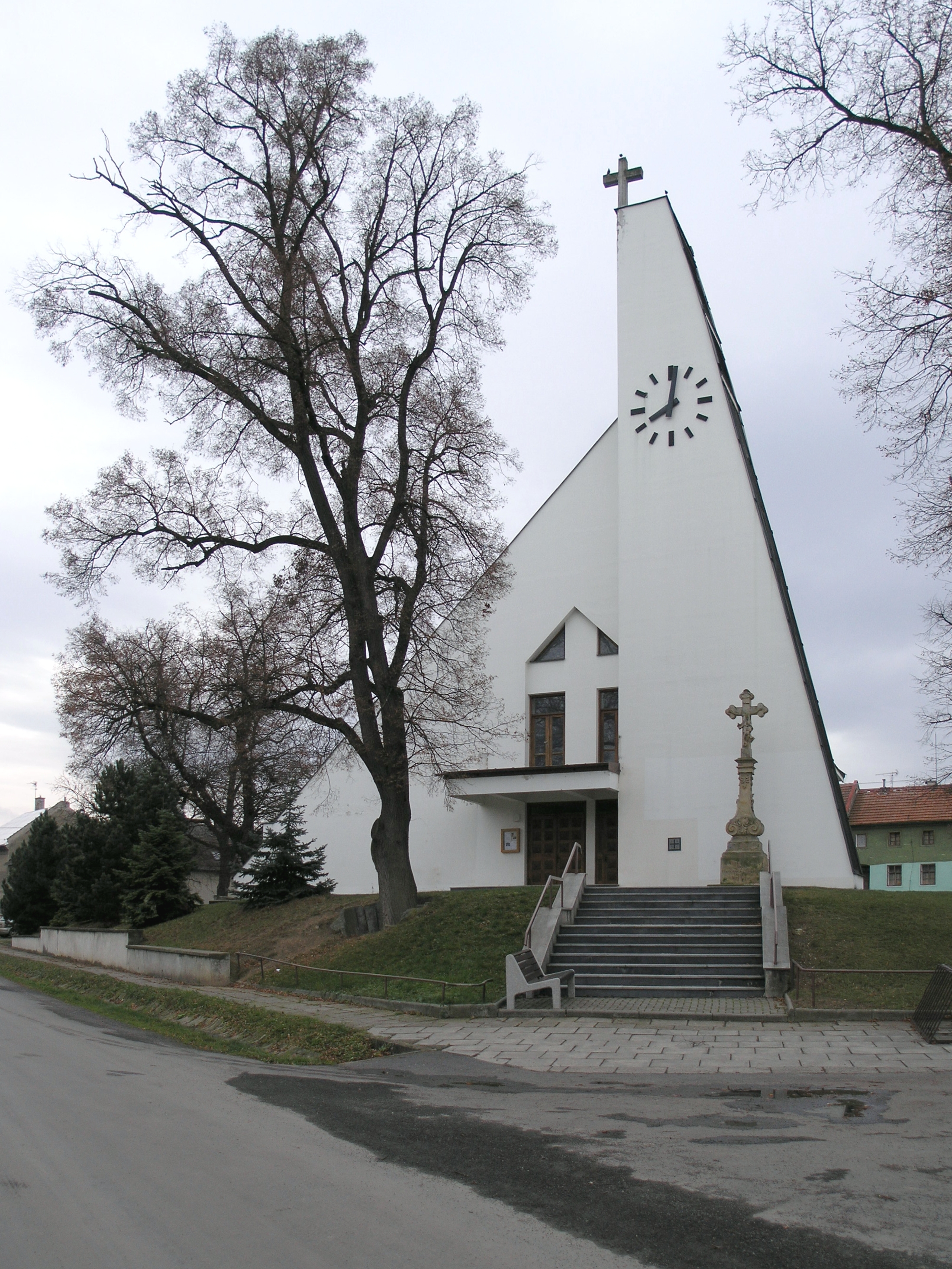 Kostel svatého Jiljí v Křelově